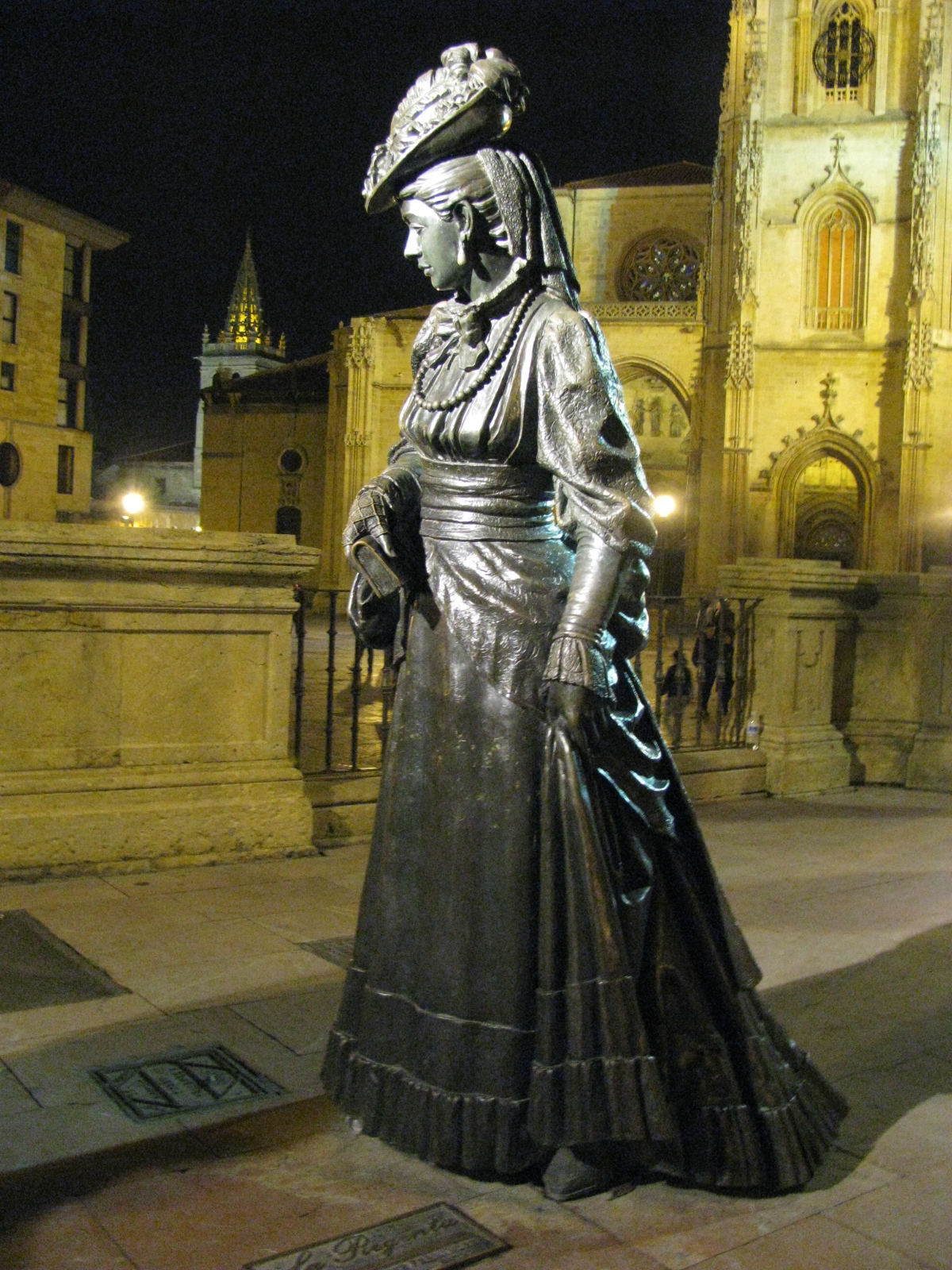 La Regenta - Oviedo